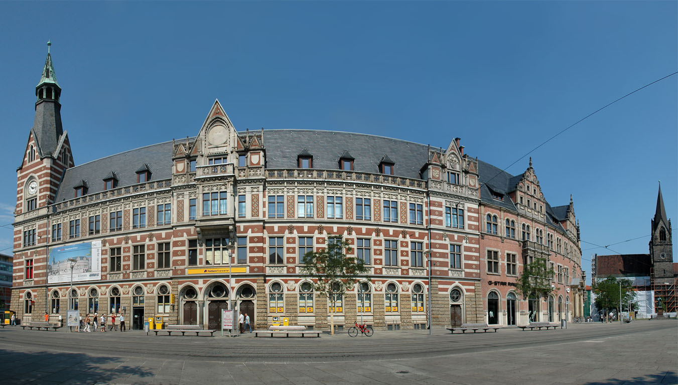 Hauptpostamt (errichtet zwischen 1882 und 1886, zwischen 1905 und 1907 erweitert) mit Kaufmannskirche (erste Erwähnung 1248), am Anger in Erfurt